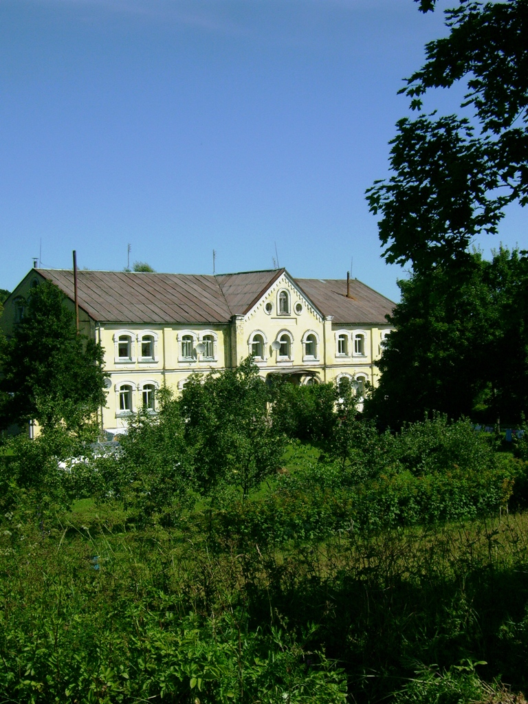 Pajūrio vienuolynas